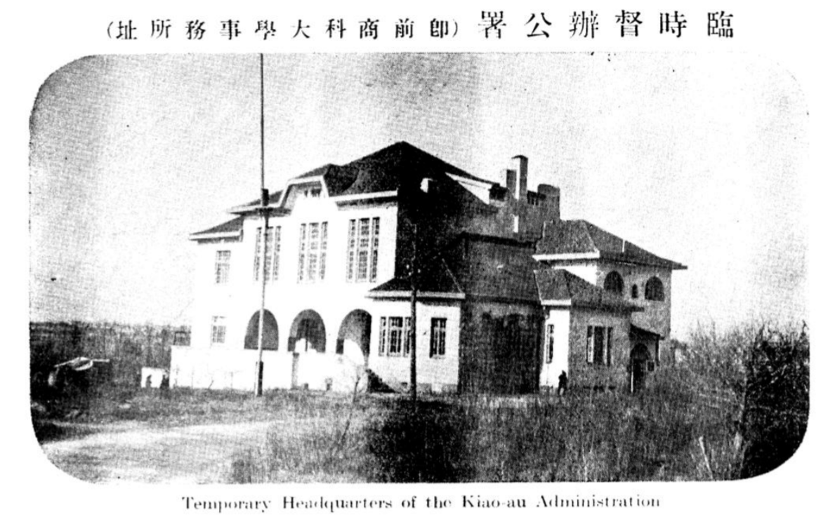 青岛临时督办公署